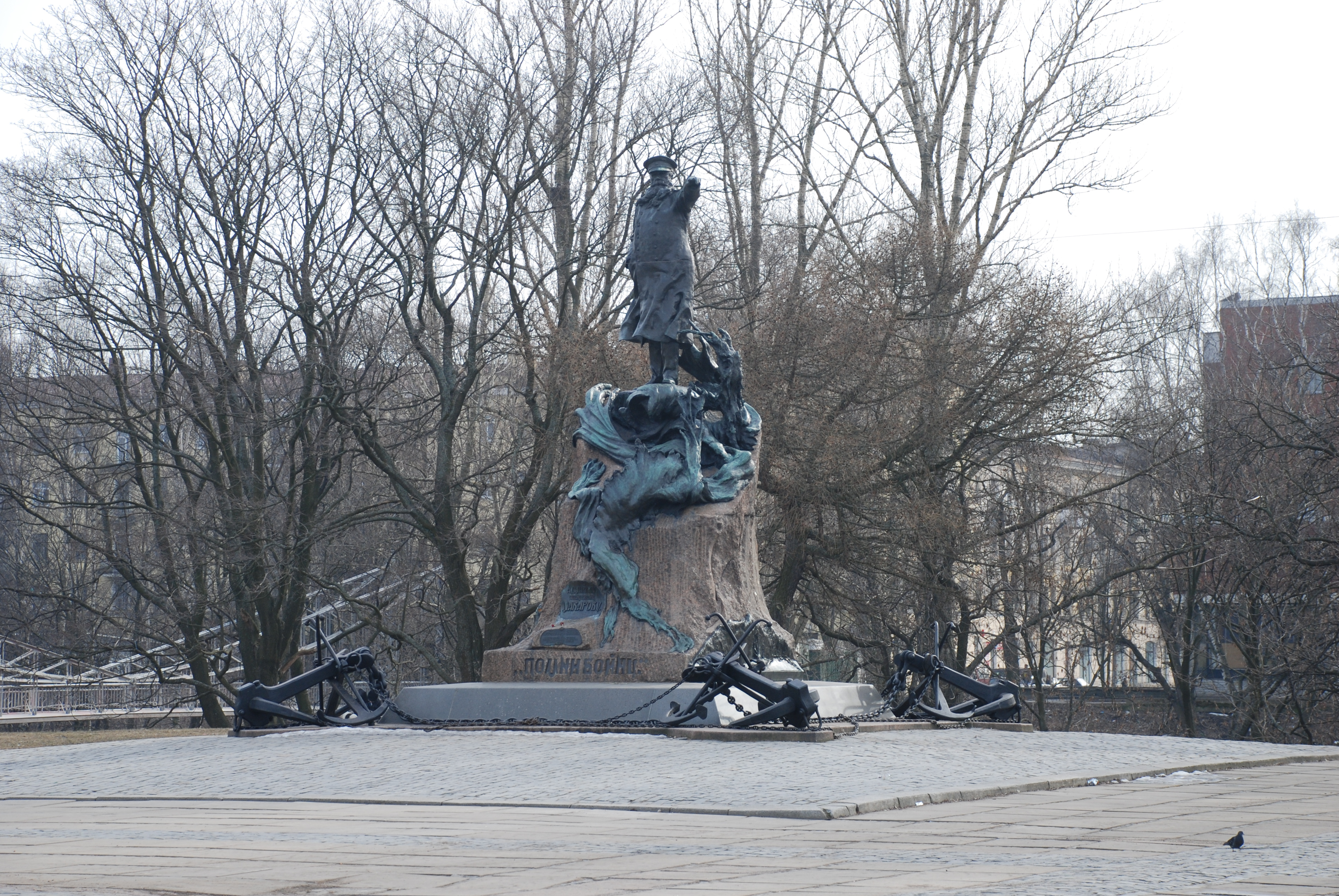 Памятник С.О. Макарову в Кронштадте (Stepan Makarov monument in Kronstadt)